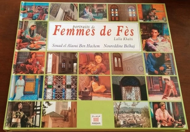 Photo de la couverture du livre